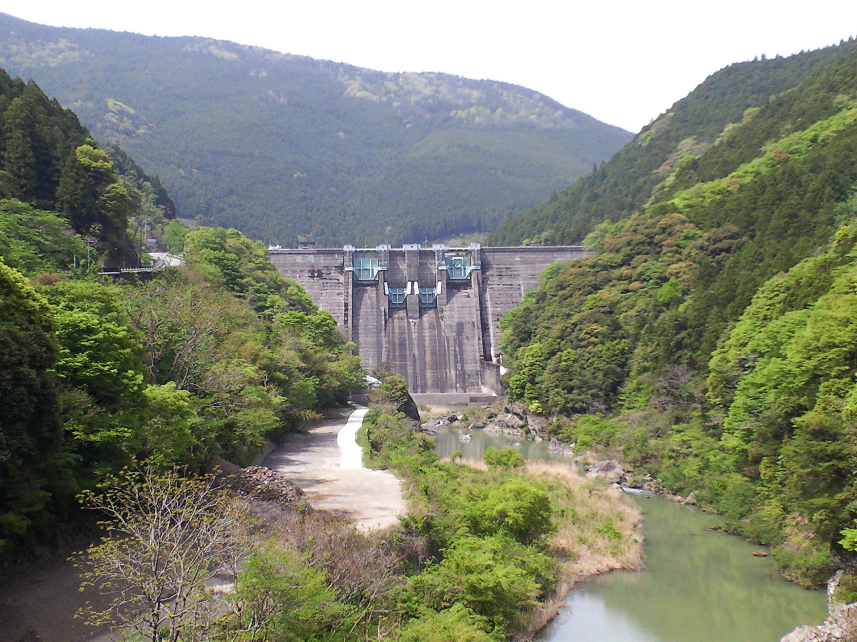 二川ダム (和歌山県有田郡有田川町)